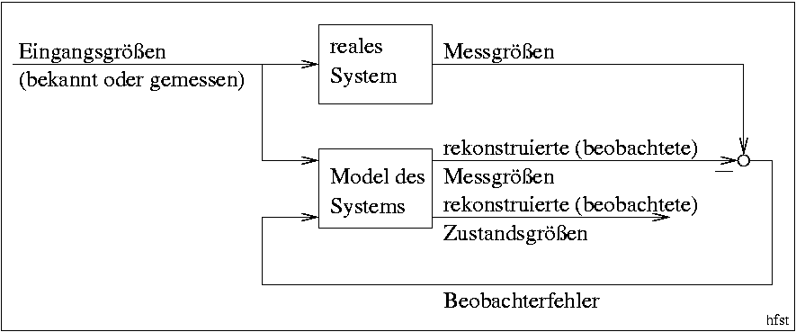 Dies Bild zeigt den prinzipiellen Aufbau eines Beobachters (Regelungstechnik) vgl. Beobachter (Regelungstechnik) bestehend aus Strecke, Modell und Rückführung des Fehlers der gemessenen Größen. This figure shows the main principles of an observer (in german) Eingangsgrößen = Input values bekannt oder gemessen = known or measured reales System = real system Messgrößen = measured values Model des System = model of the system rekonstruierte (beobachtete) Messgrößen = measured values reconstructed by the model rekonstruierte (beobachtete) Zustandsgrößen = states, reconstructed by the model